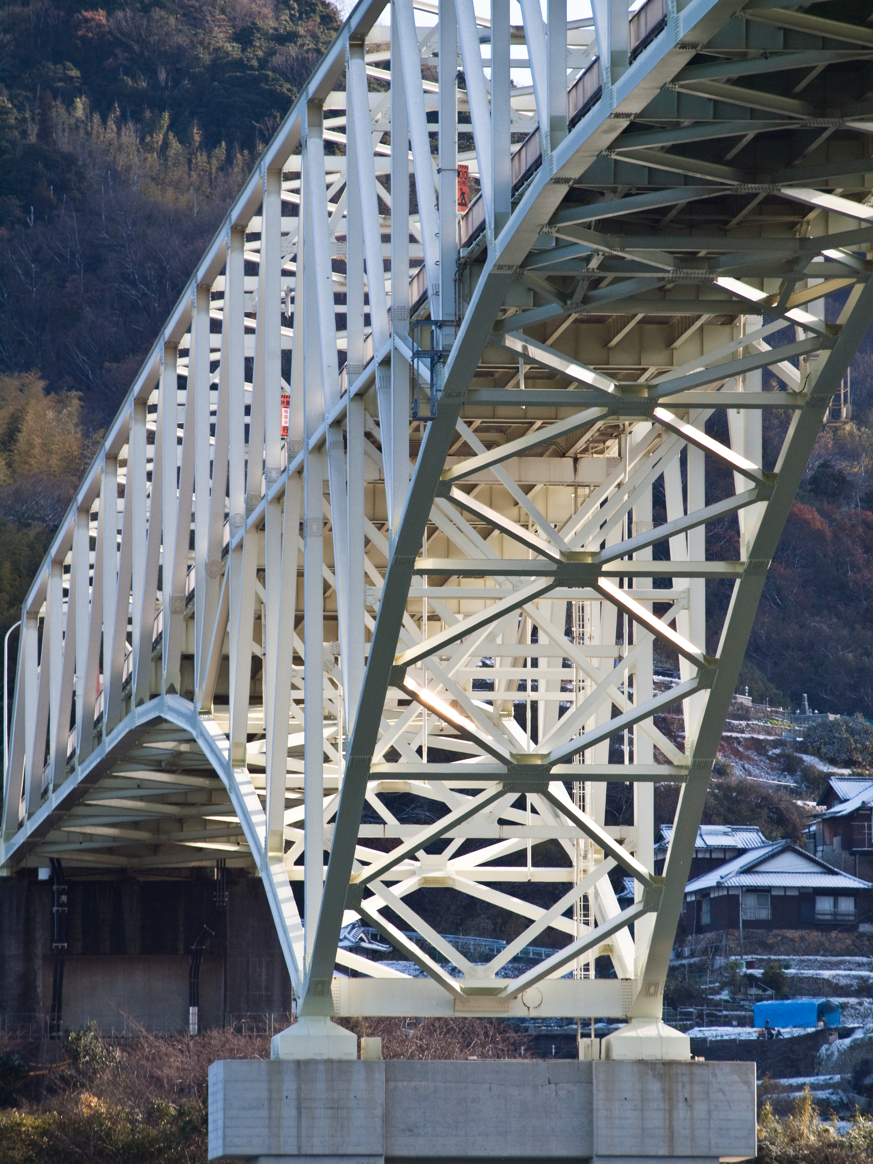 Hayase Bridge